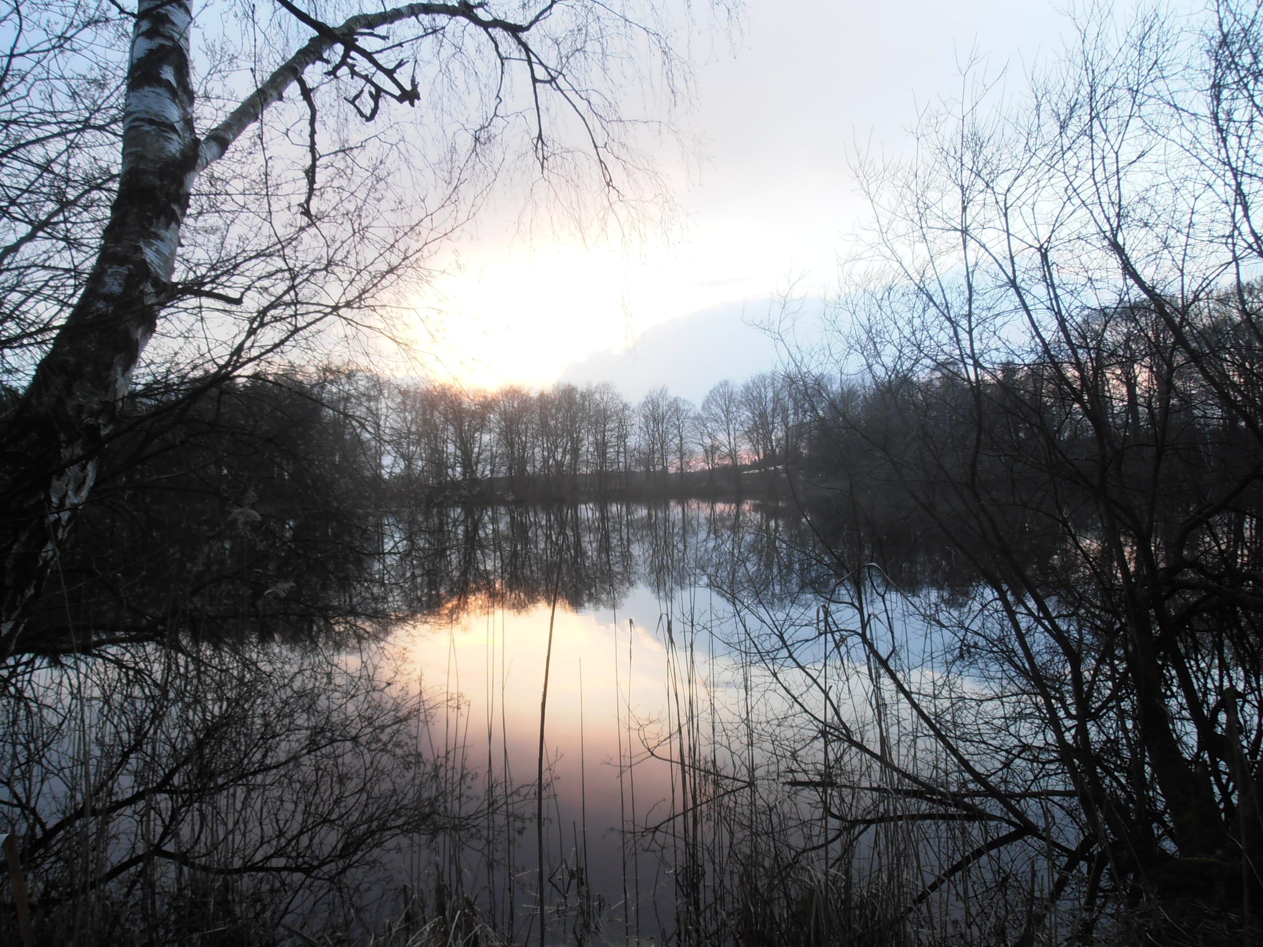 Das Lechtegoor, ein Naturschutzgebiet in der niedersächsischen Gemeinde Gersten im Landkreis Emsland. Blick von O